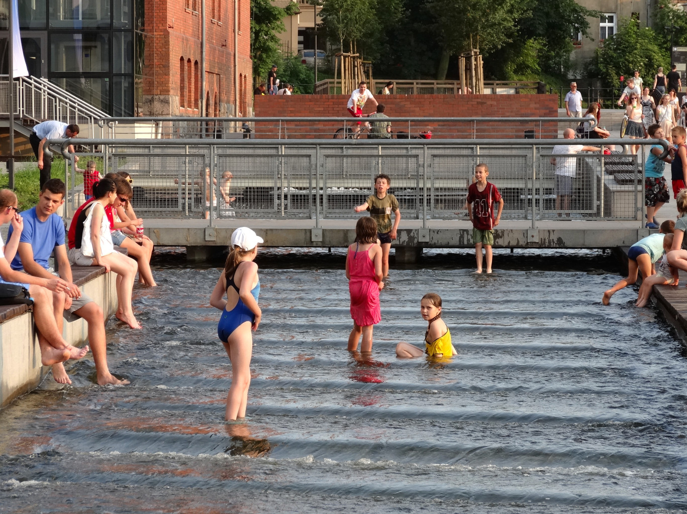 Kaskada Międzywodzie na Wyspie Młyńskiej w Bydgoszczy odtworzona w 2007 roku